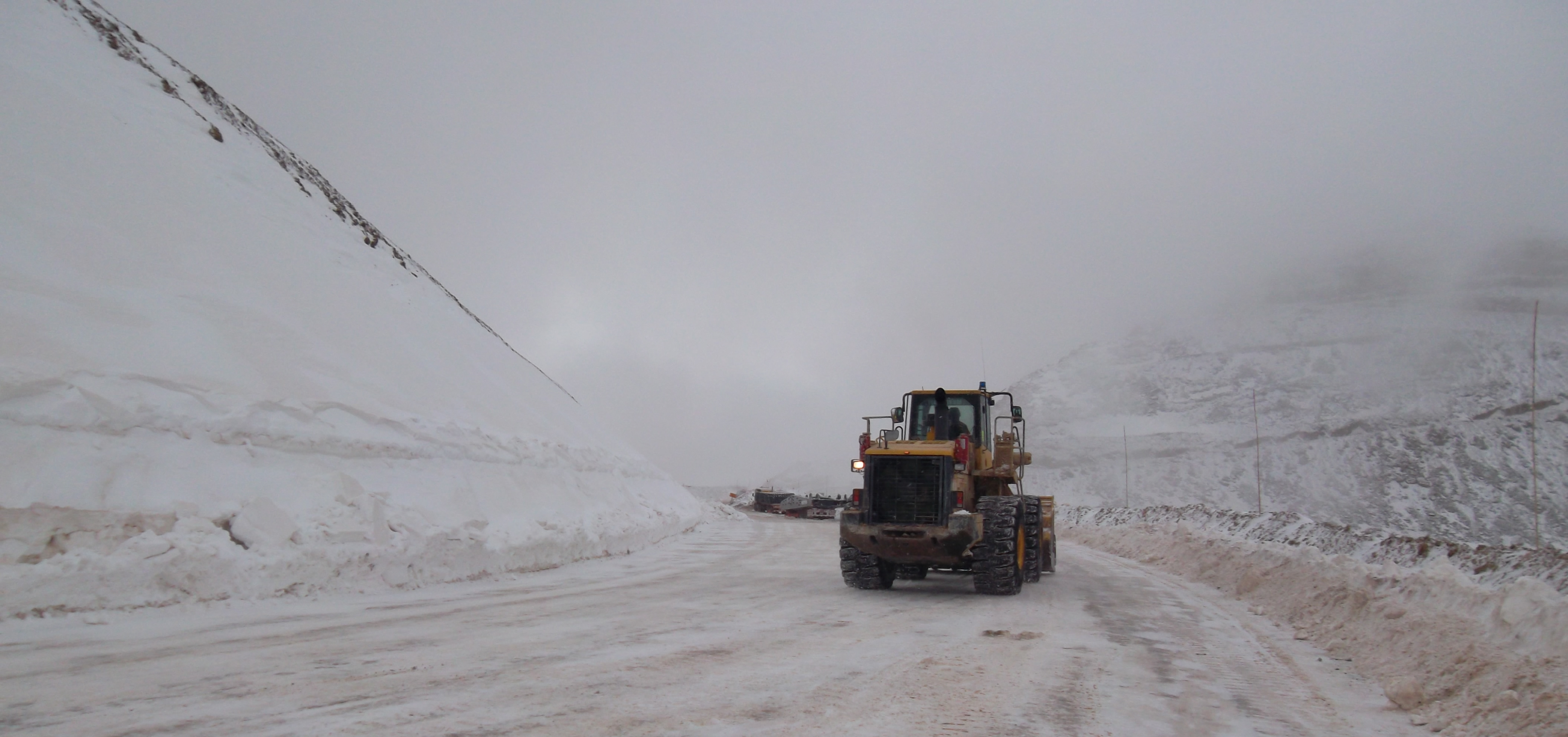 Pascua Lama